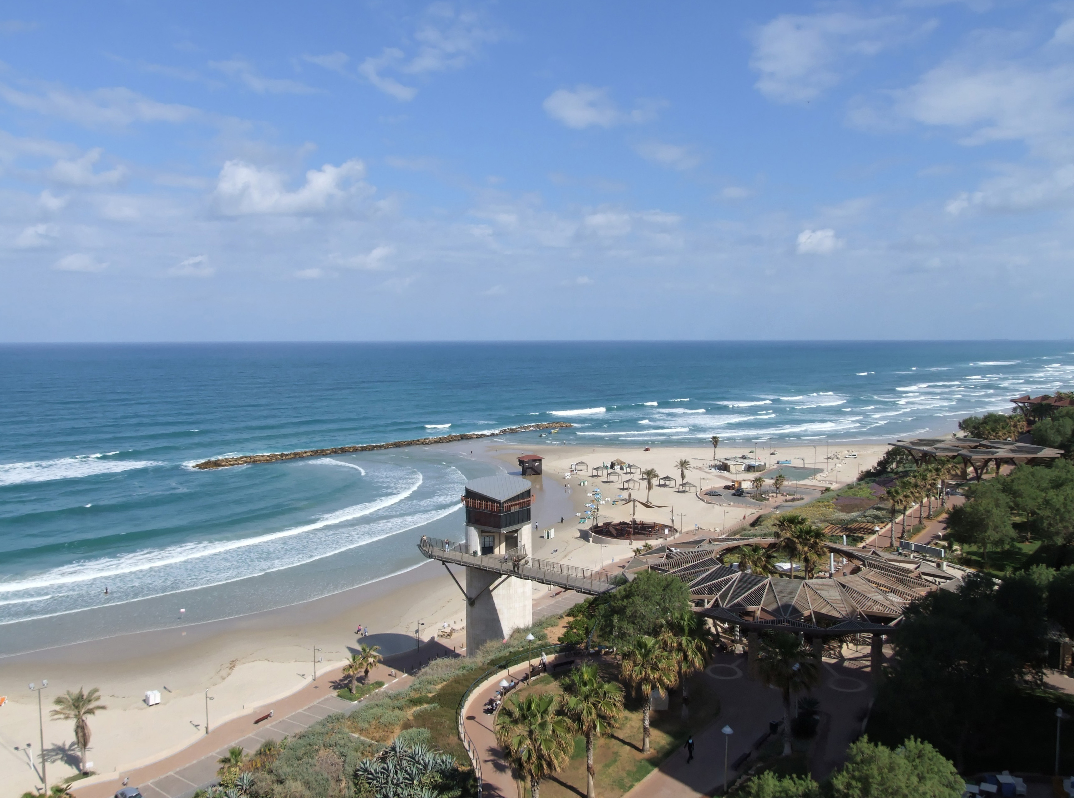 Netanya, Israël - 2008 Netanya